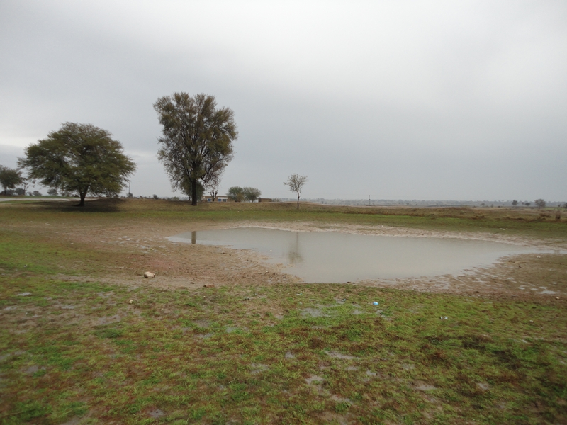 DHULLI after rain_25-2-11